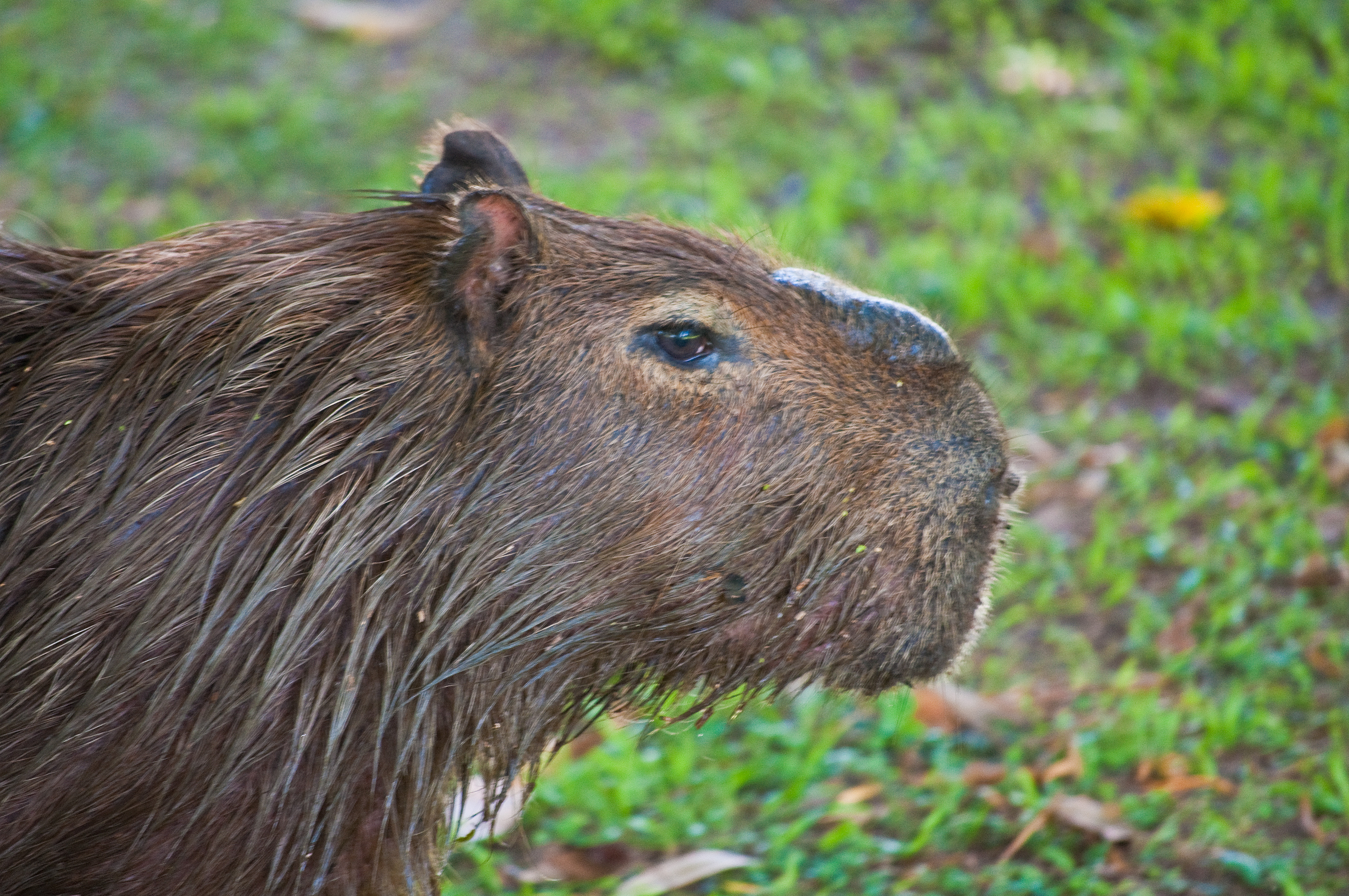 Capybara, Esteros del Ibera, Corrientes, Argentina, Jan. 2011